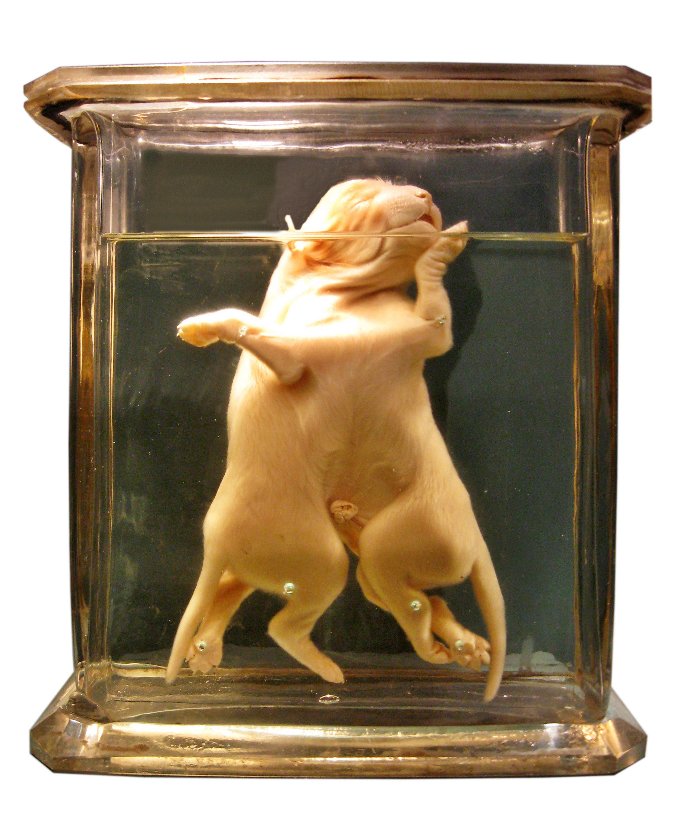 Siamesische Zwillinge